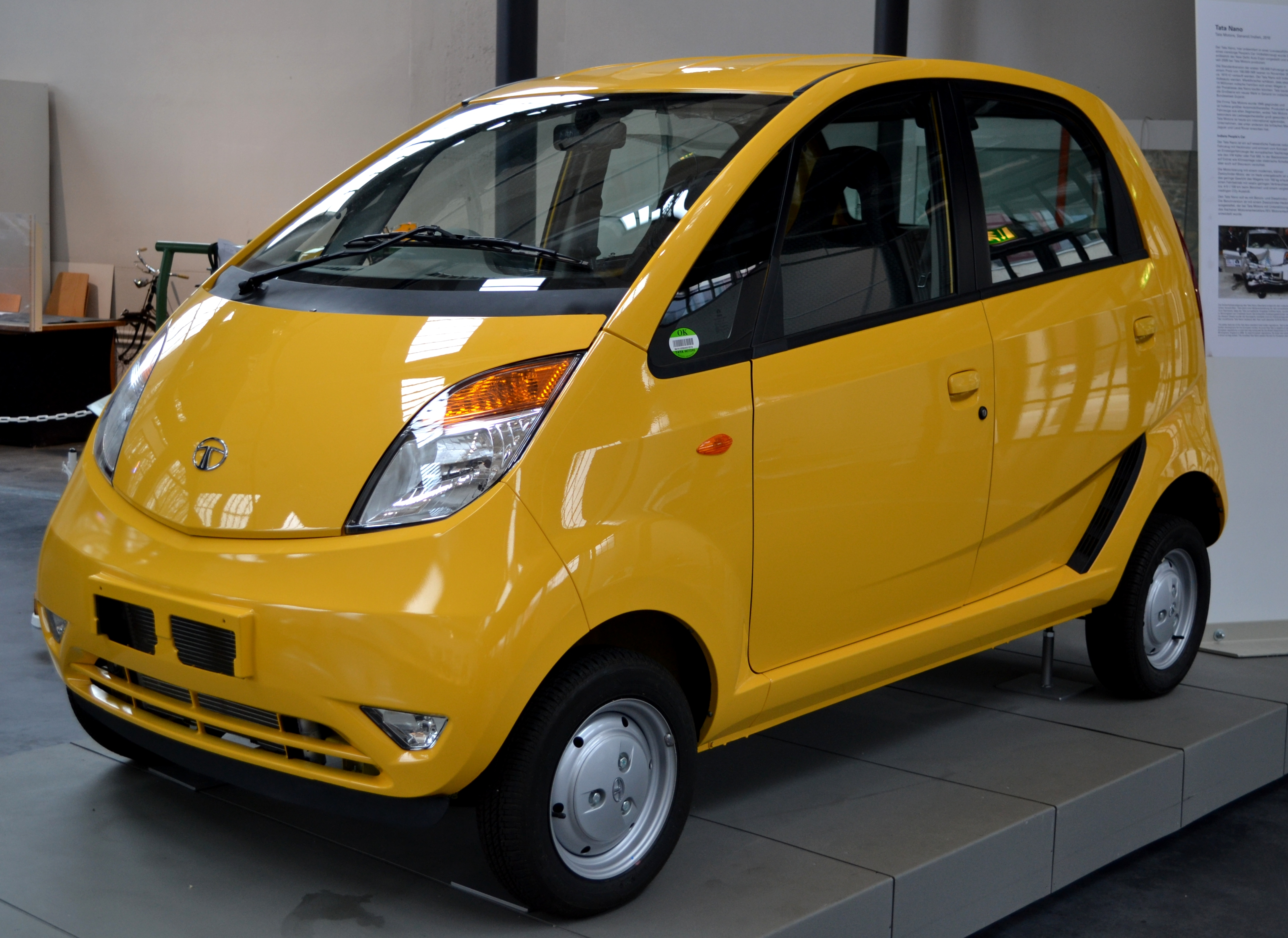 Der Tata Nano – Das "People´s Car" aus Indien im Verkehrszentrum des Deutschen Museums - Halle I.